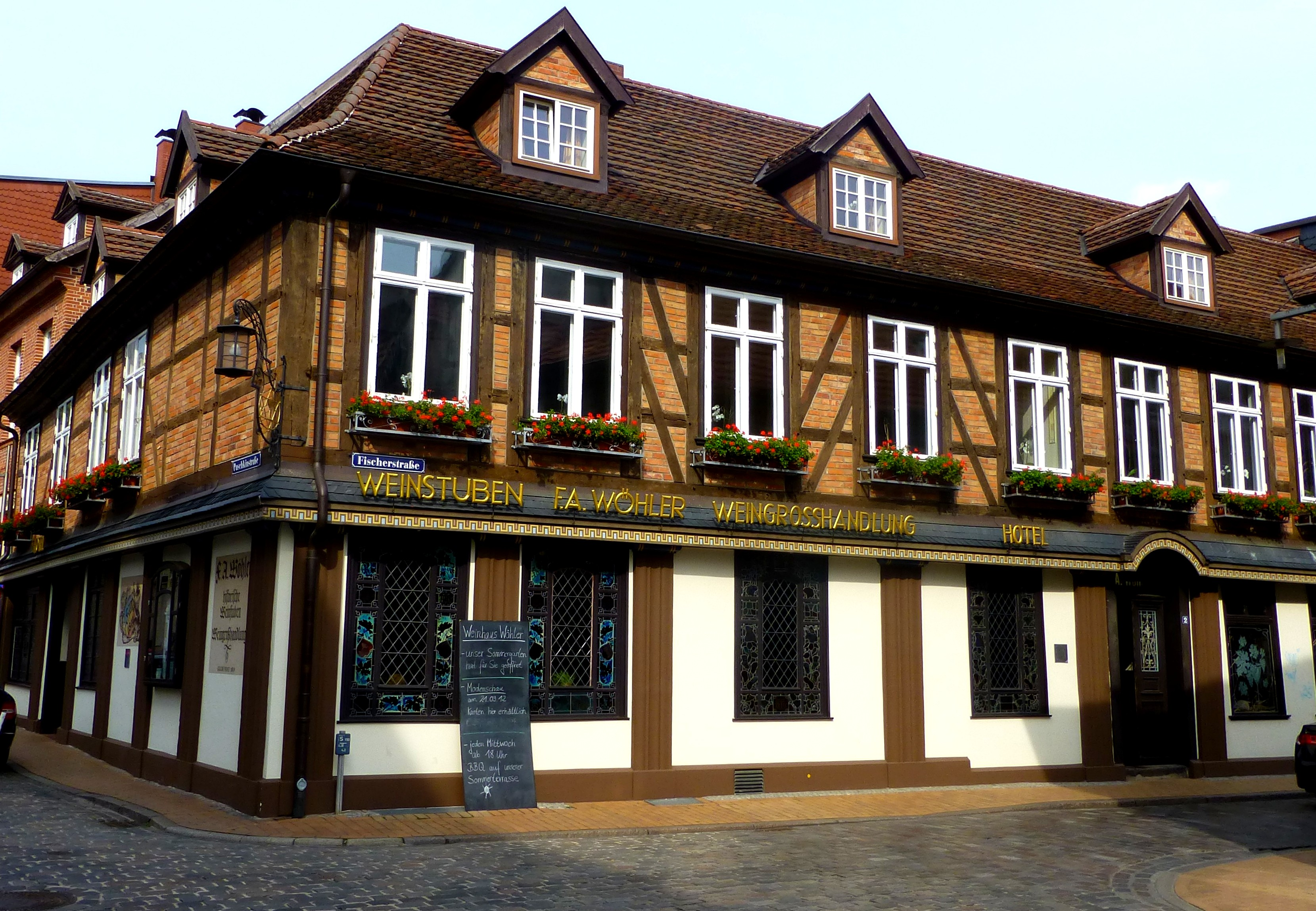 Schwerin – Hotel und Historisches Weinhaus Wöhler